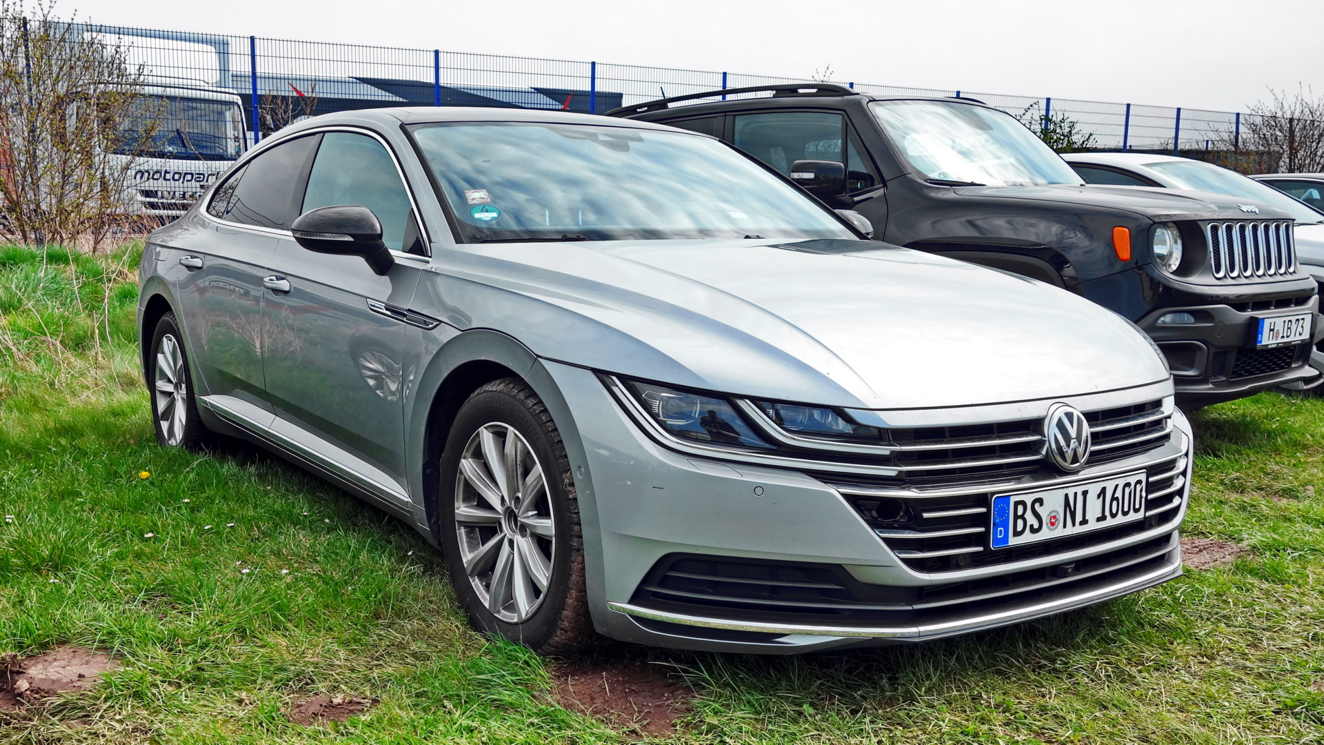 VW Arteon